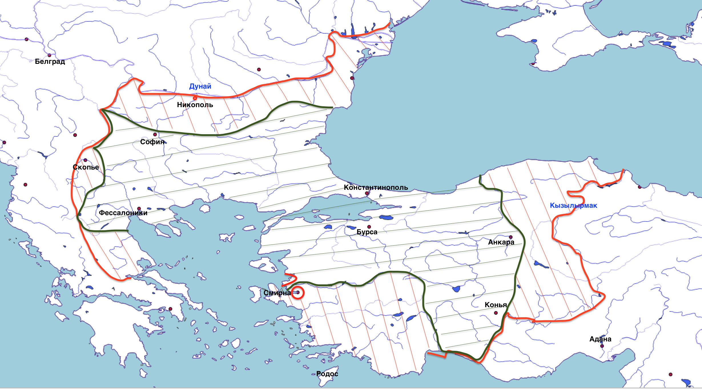 Зелёным помечены территории, принадлежавшие Османской империи в 1389 году. Красным помечены территории, завоёванные Баязидом I к 1396 году.